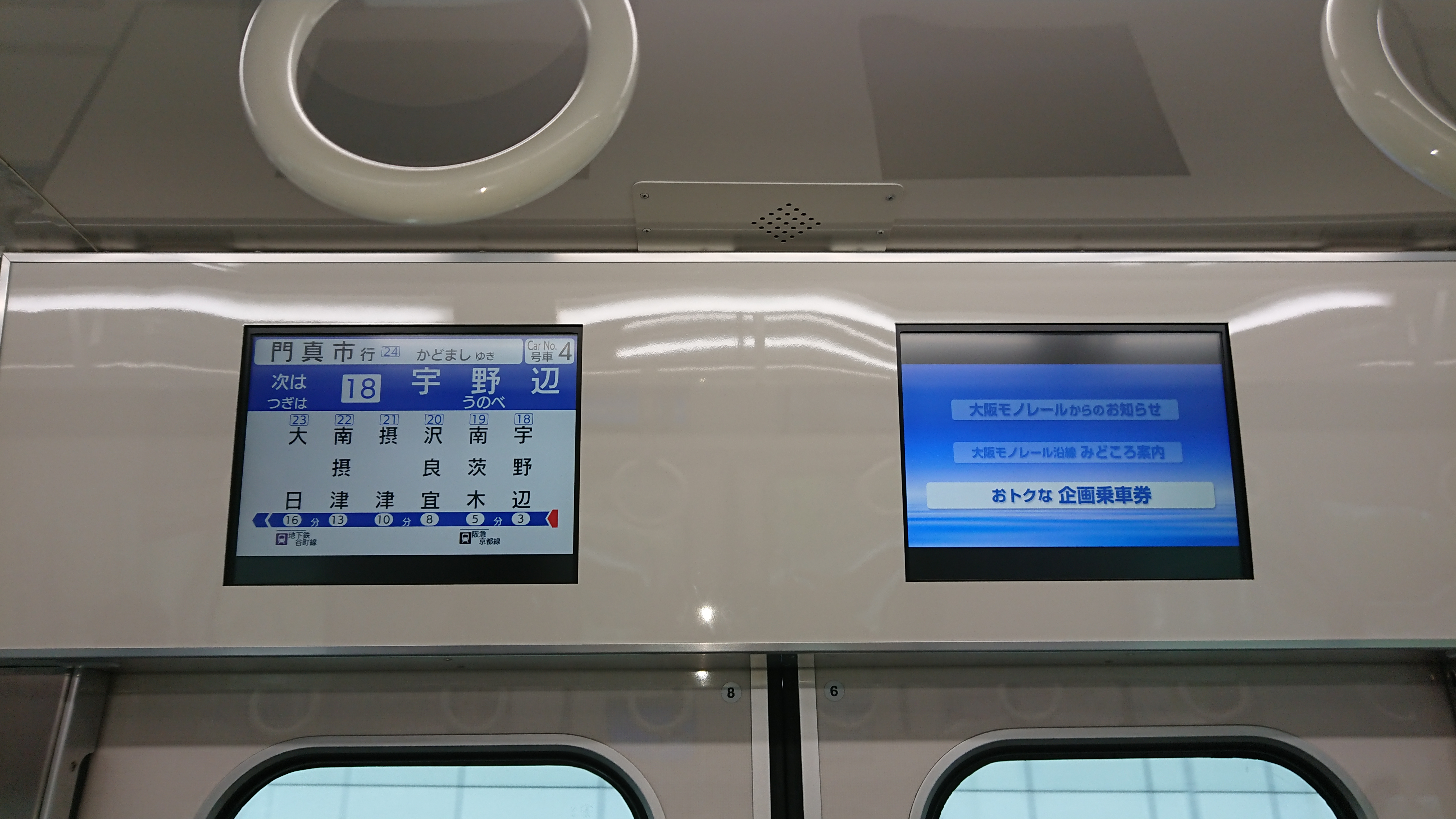 大阪高速鉄道（大阪モノレール）の2000系の17編成の車内に設置された「案内情報画面」。